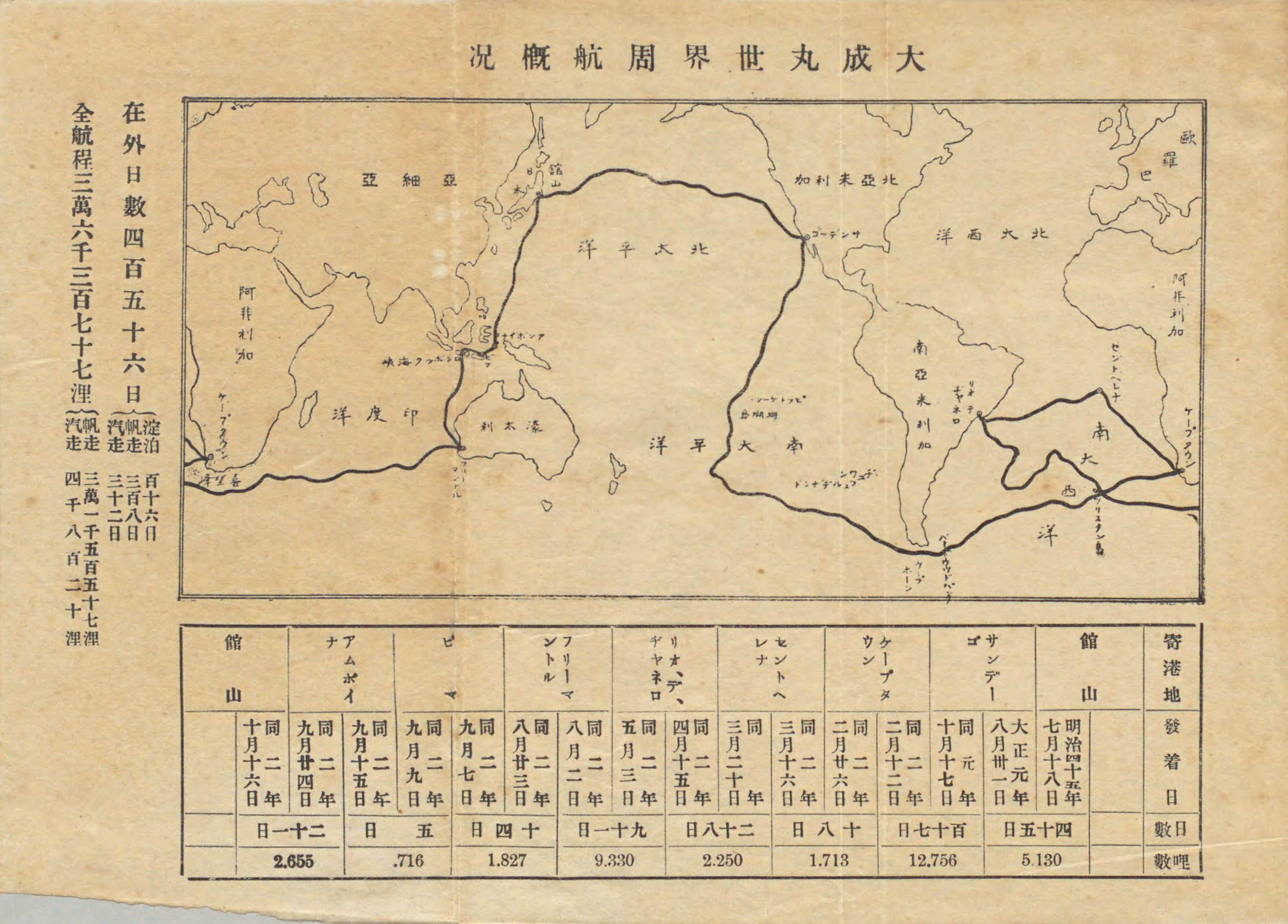 「大成丸世界周航概況」 米窪太刀雄 『海のロマンス』 中興館書店、1915年2月。